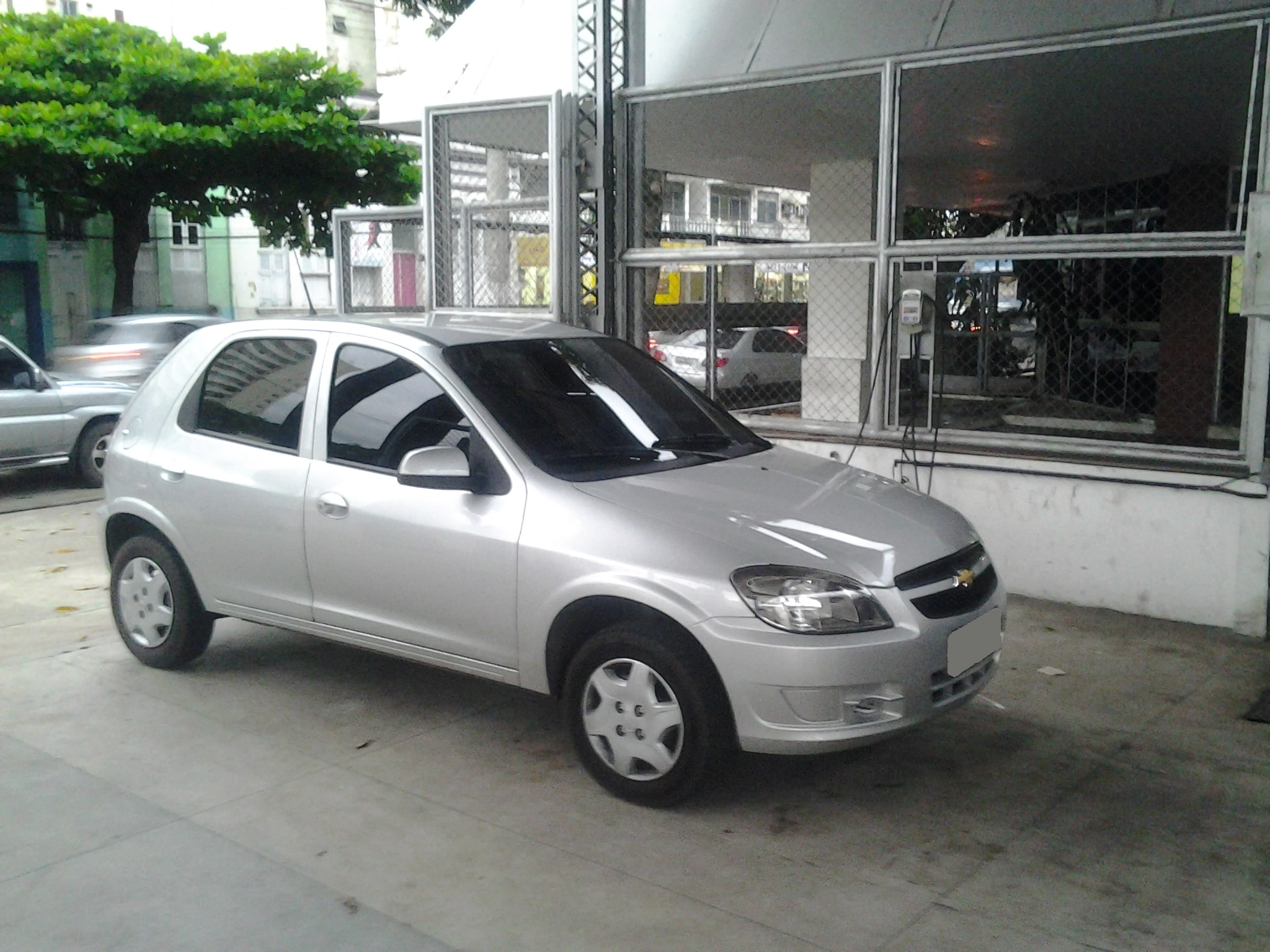 CHEVROLET CELTA 2013